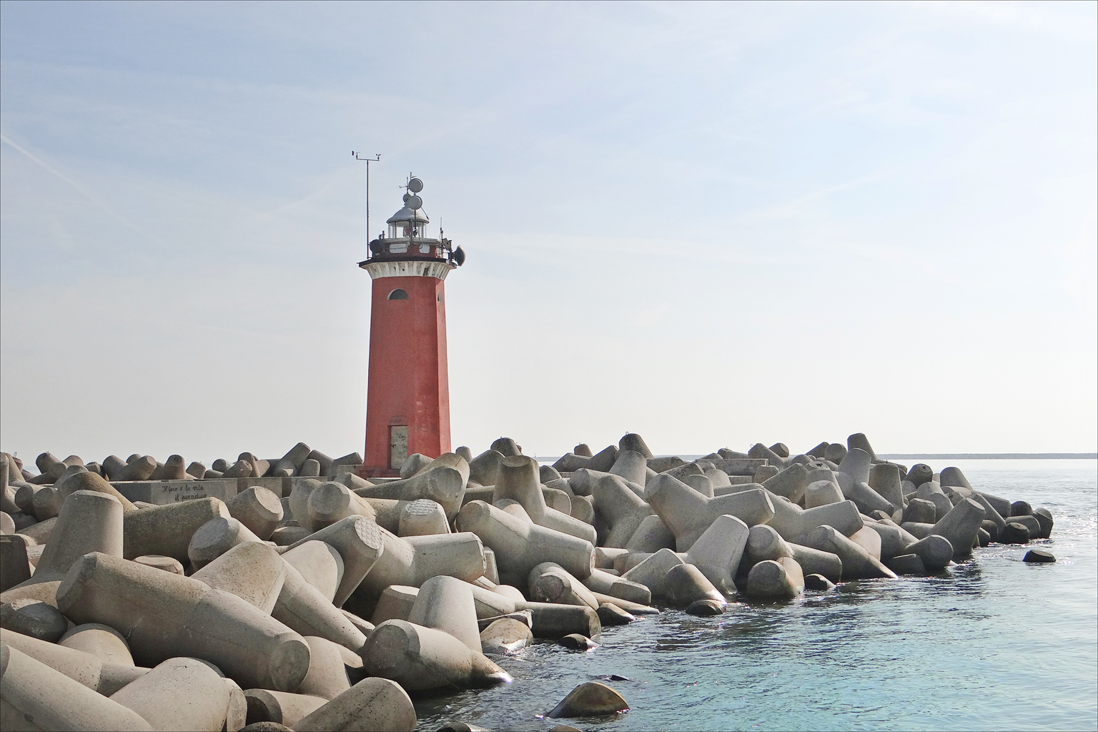 Le phare de San Nicolo est à l'extrémité de la jetée sud qui délimite la passe du Lido Au fond, en pleine mer, une digue a été construite dans le cadre du projet MOSE pour limiter l'action des marées au niveau de la passe. Site du projet MOSE